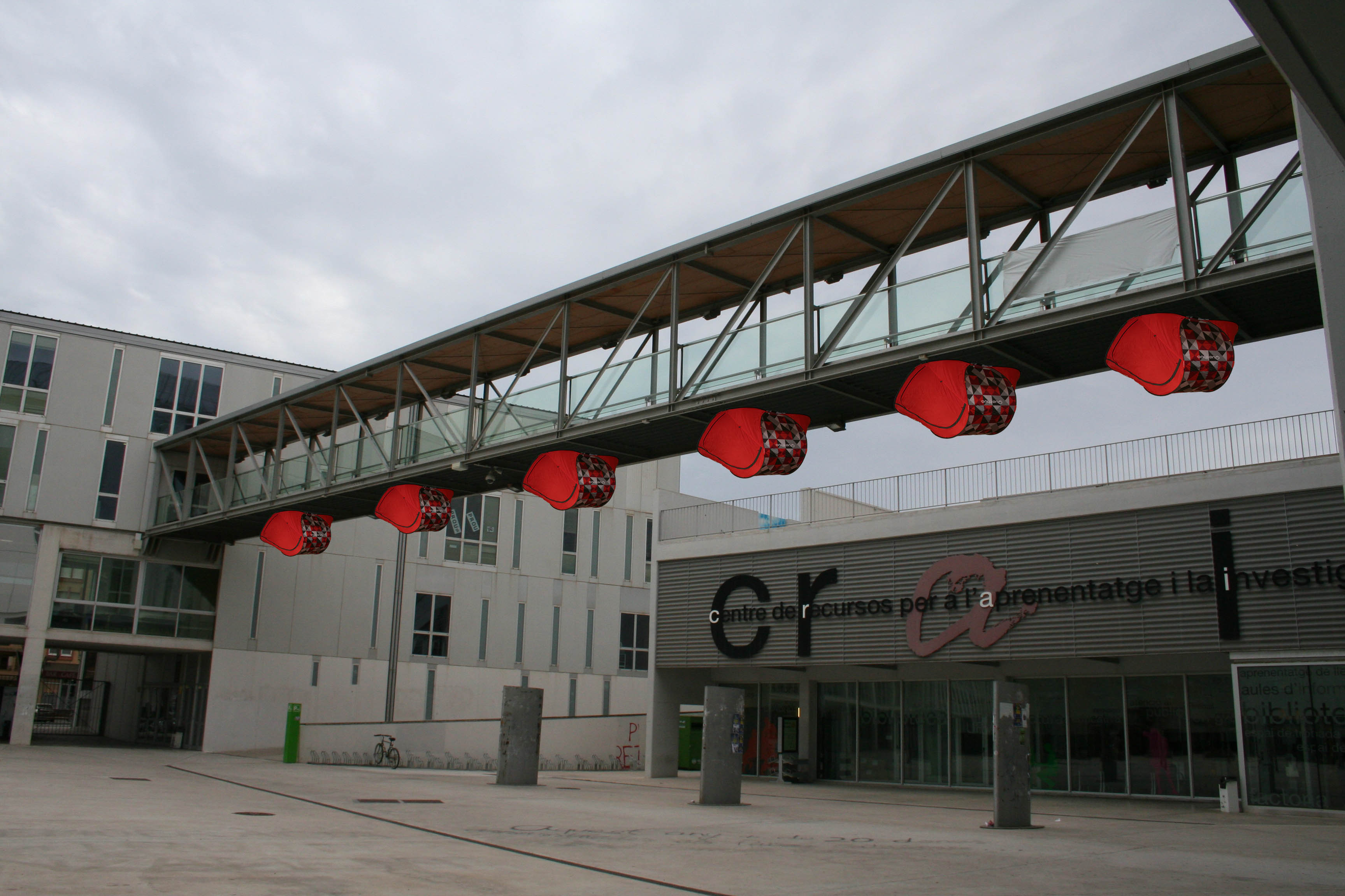 Projecte de instal·lació al Campus de la Universitat Rovira i Virgili de Tarragona